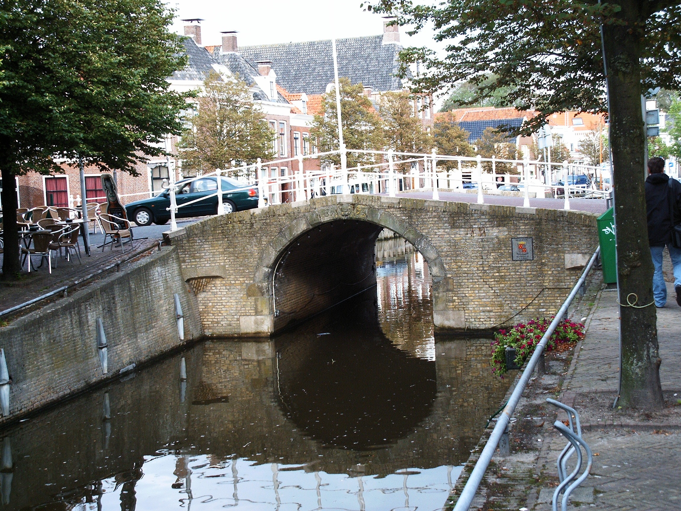 Harlingen - Gracht - Zakkendragerspijp